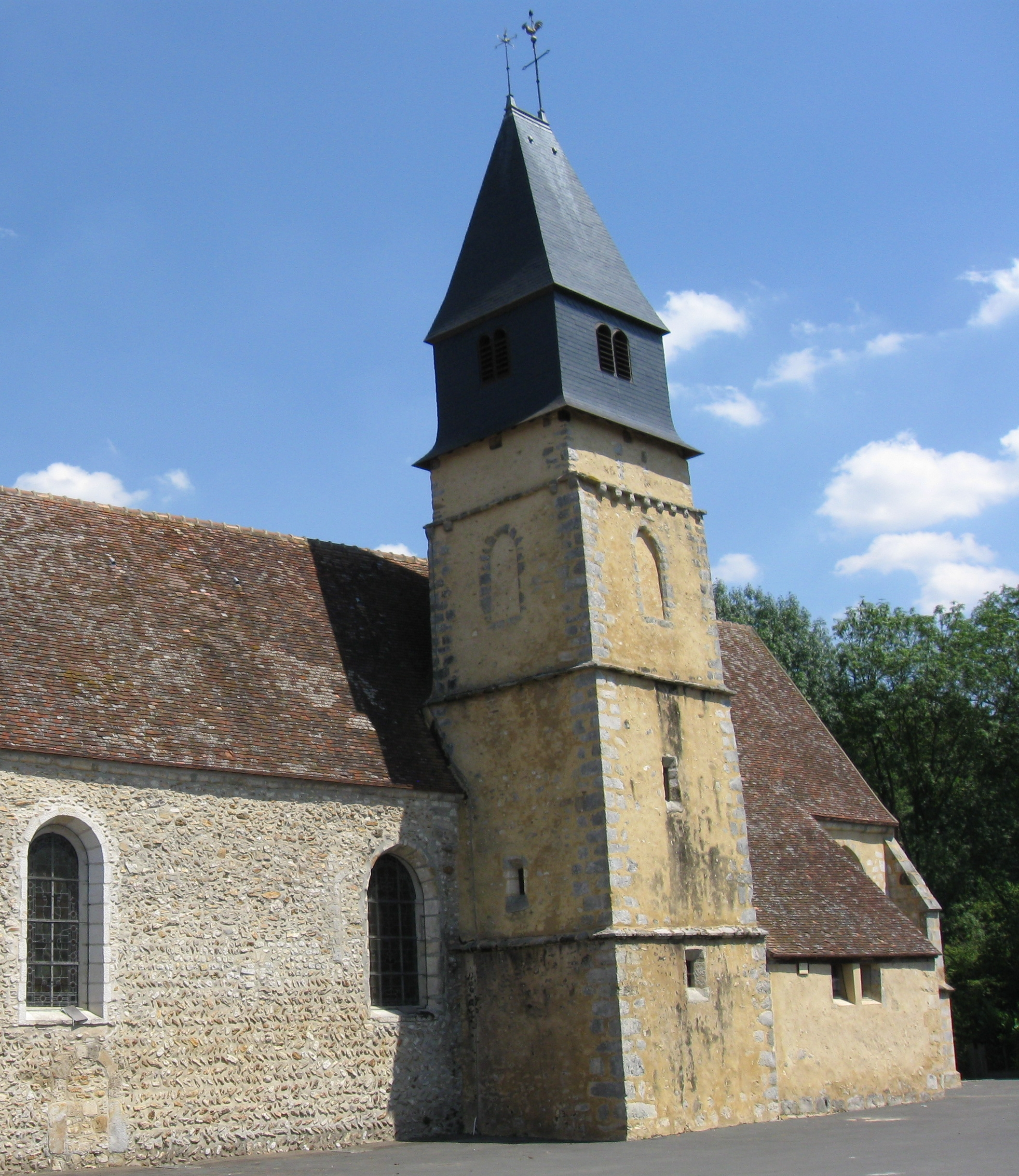 Église Saint-Pierre de Droue-sur-Drouette. (département d'Eure-et-Loir, région Centre).